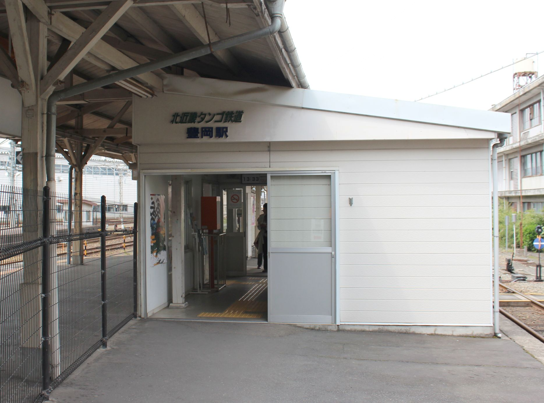 北近畿タンゴ鉄道・豊岡駅